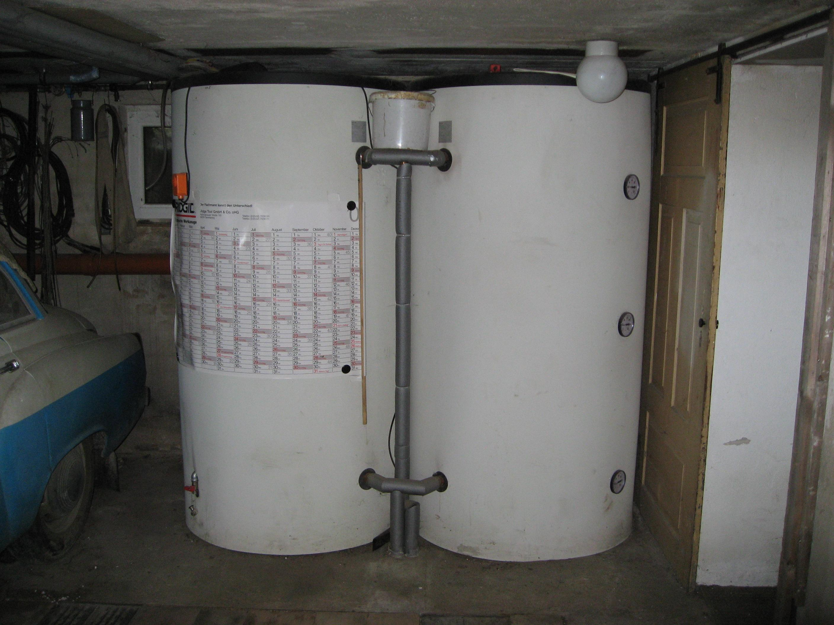 2 Puffer einer Heizungsanlage mit 2000 Liter Gesamtkapazität (im Keller eines Einfamilienhauses, Heizungsanlage mit Scheitholzvergaser)